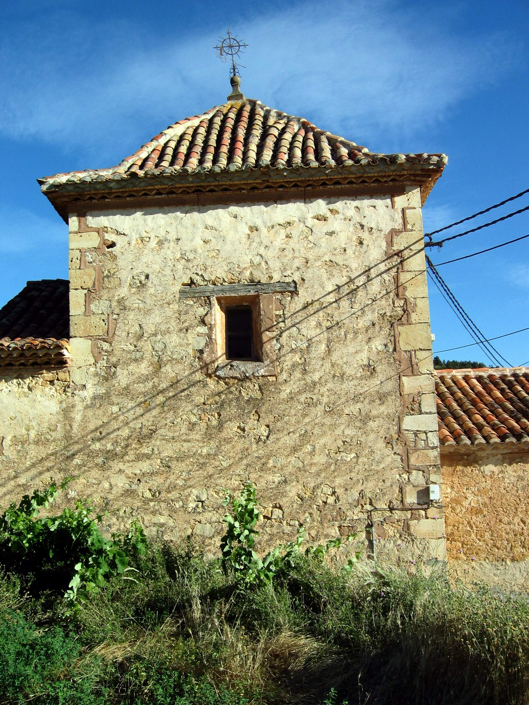 Detalle de la cabecera de la iglesia parroquial de Sesga, Ademuz (Valencia), correspondiente a la cúpula del presbiterio. Siglos XVI-XVII.